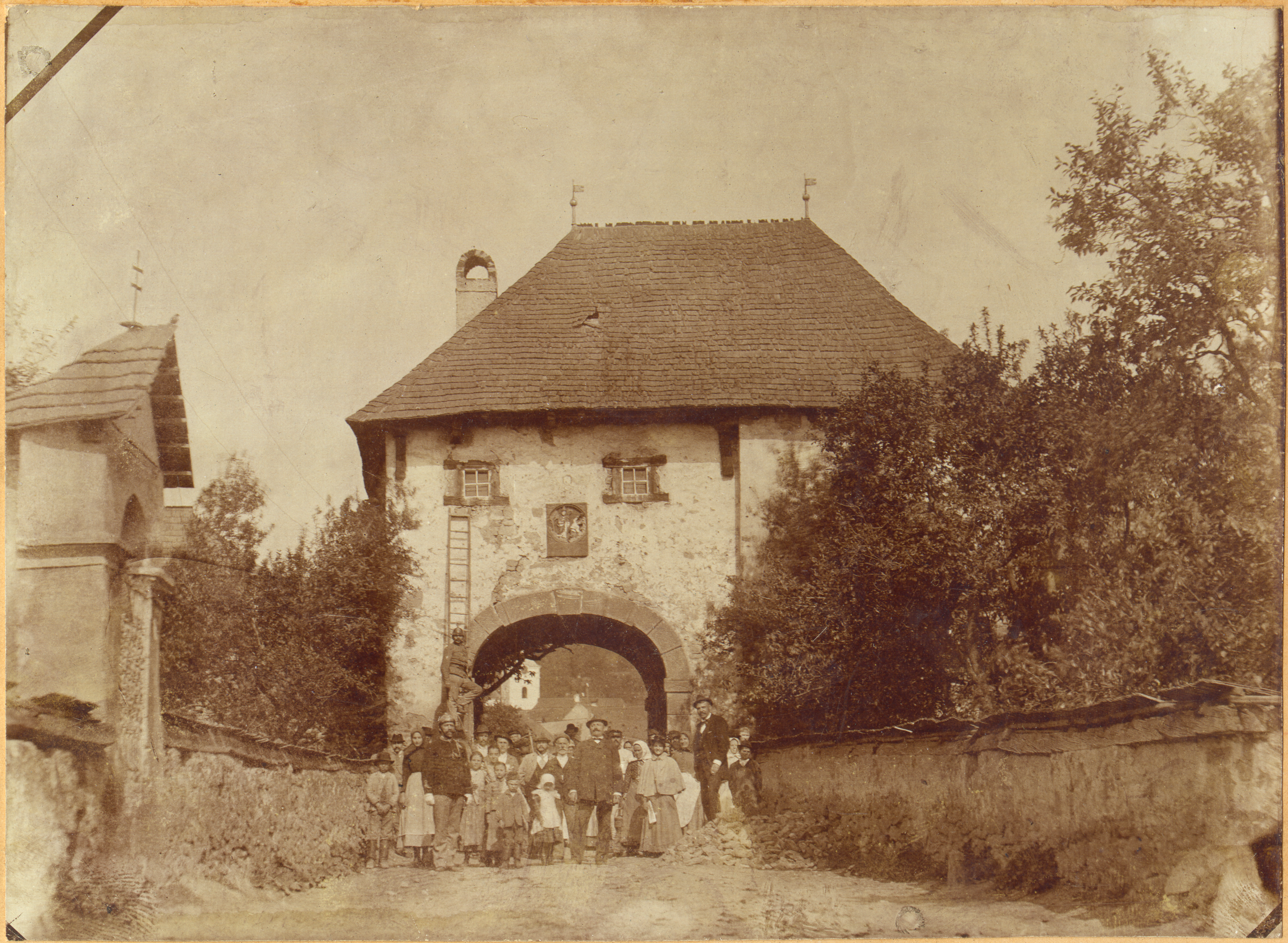 Dolná mestská brána v Pukanci, zbúraná v roku 1899, scan historickej fotografie z archívu mestského úradu v Pukanci, 600dpi